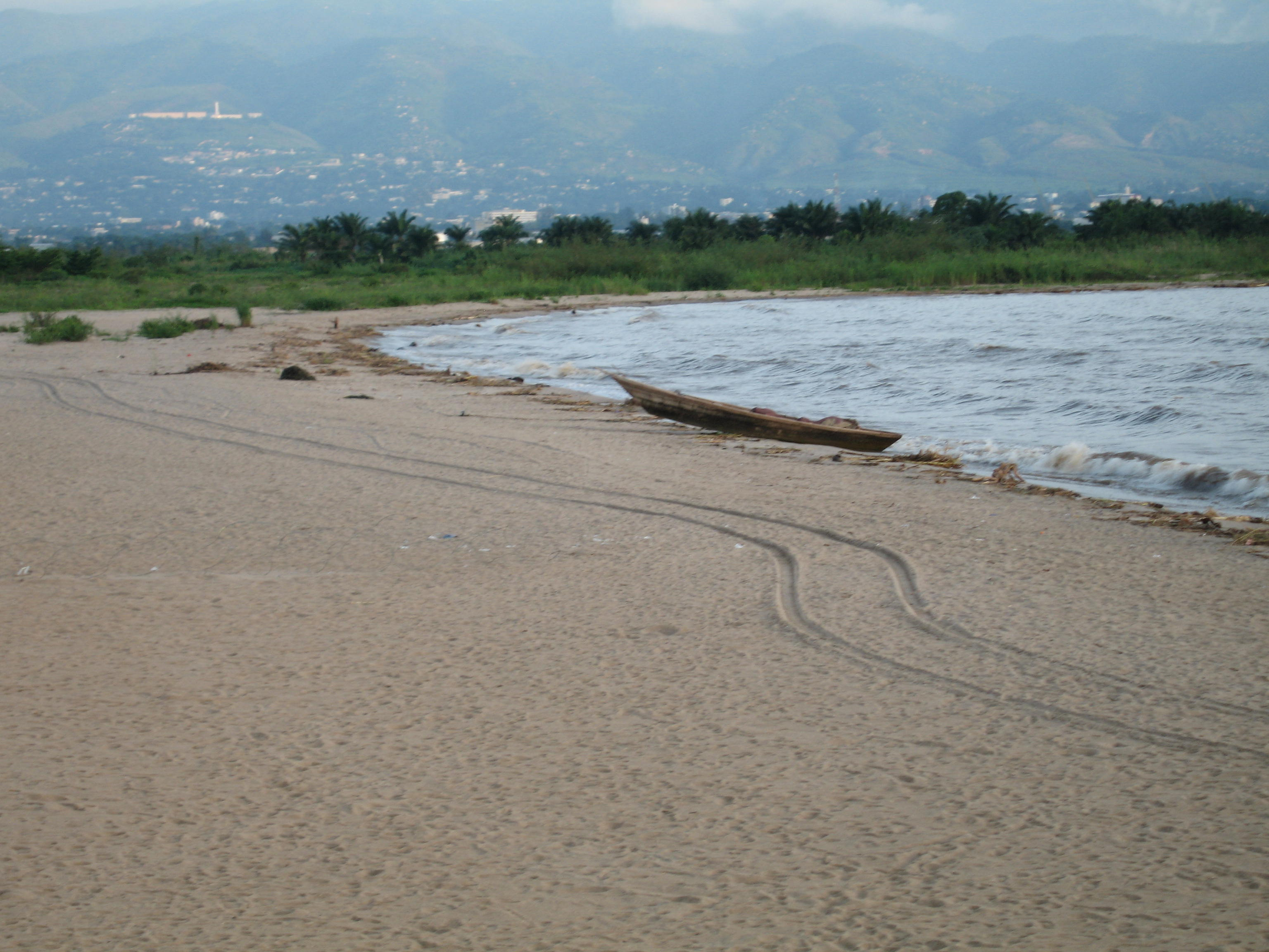 Plage des Cocotiers. Coconuts Beach. Playa de los Cocos. Bujumbura, Burundi.